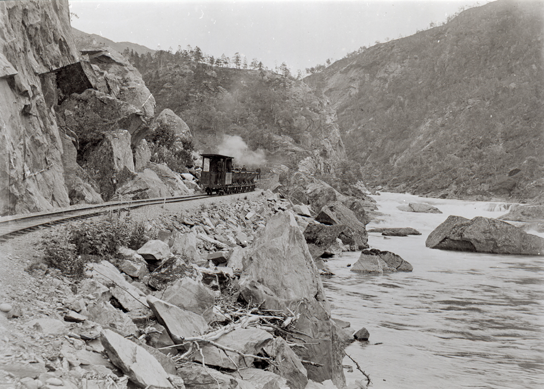 Et lokomotiv med vogner, jernbaneskinner opp Sjønstådalen. 1885 - 1918 NM.F.007972-00012